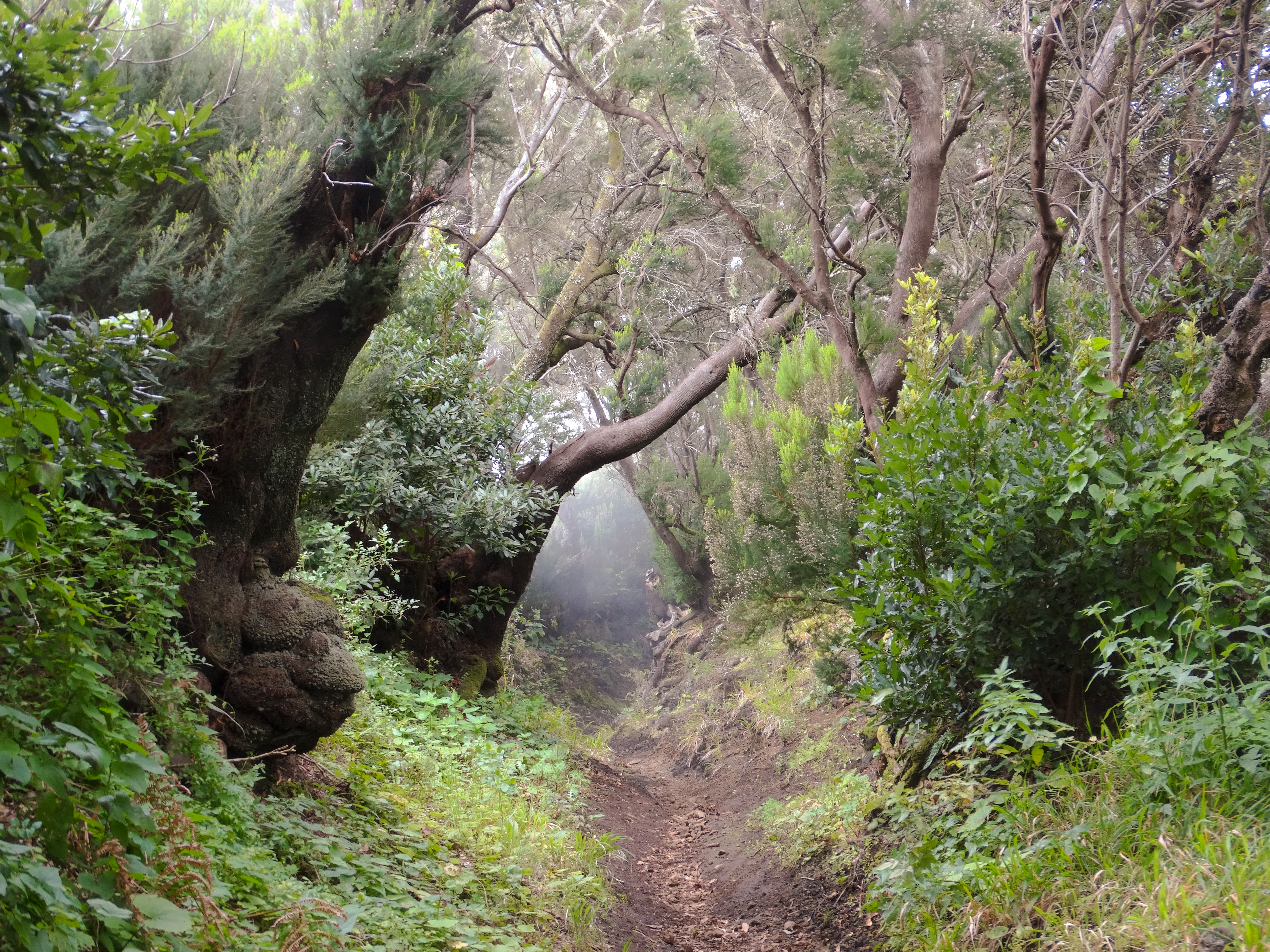 Camino por el Fayal-Brezal, lado del este del Cumbre Vieja This is a photography of a Site of Community Importance in Spain with the ID: ES7020011. Natura2000 entry, EEA entry